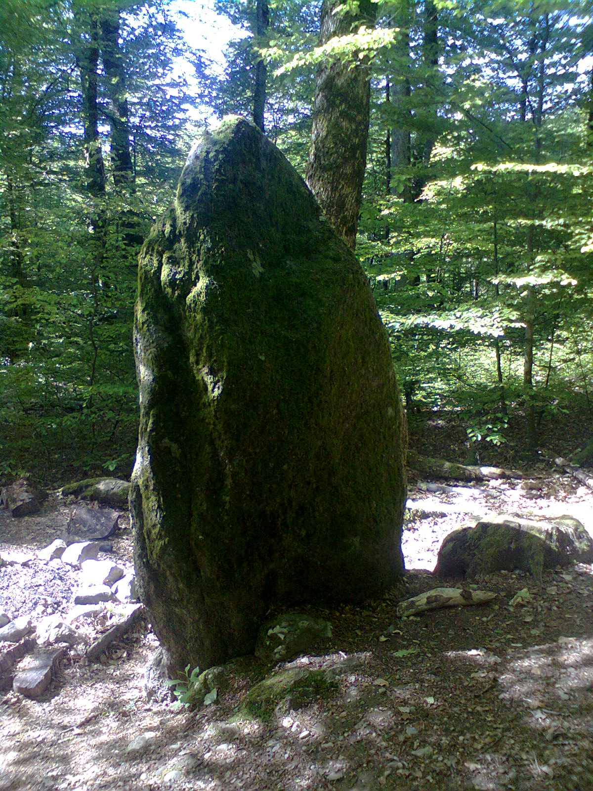 Menhir saint-aubin- sauge